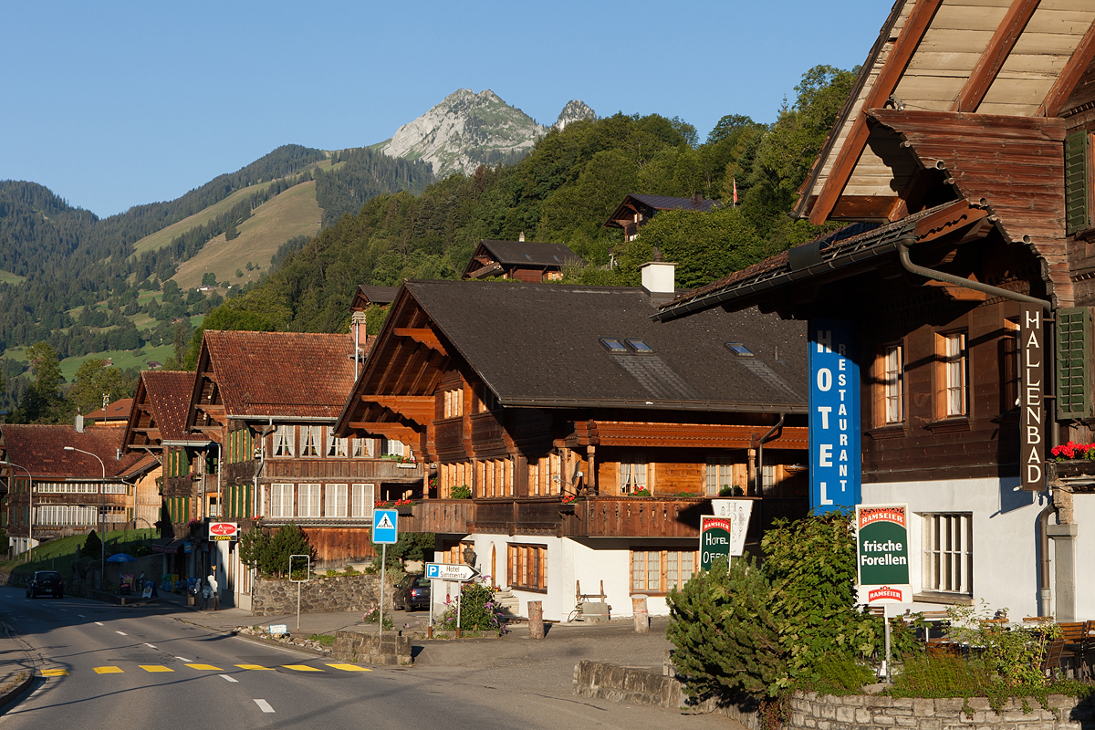 Mitten in Boltigen an der Durchfahrtsstrasse Wimmis-Zweisimmen